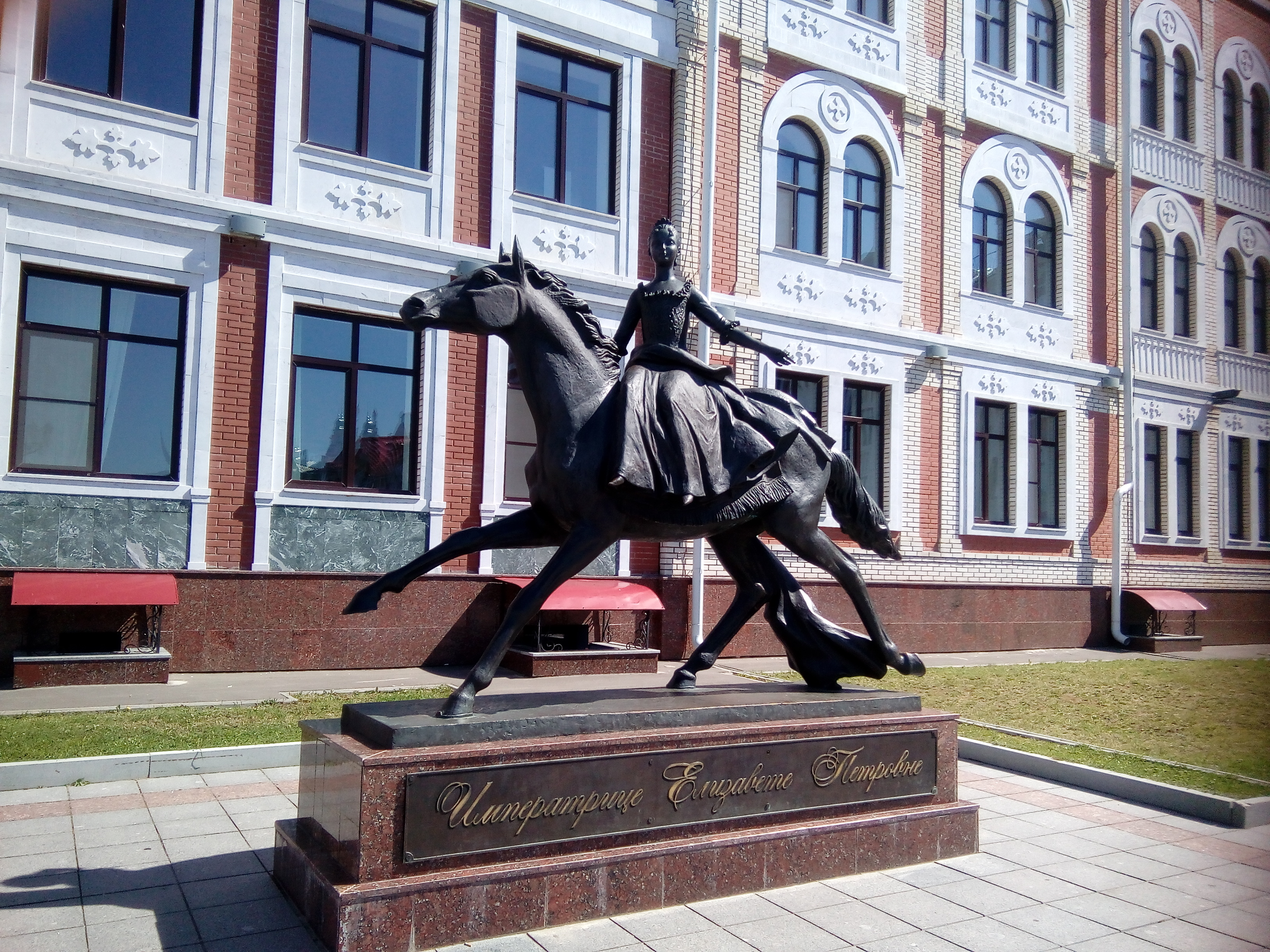 Файл представляет собой фотографию памятника Елизавете Петровне в Йошкар-Оле